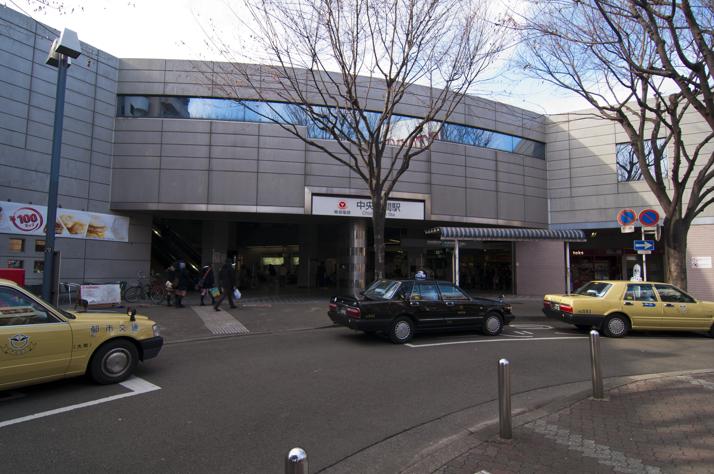 東京急行電鉄田園都市線中央林間駅正面口